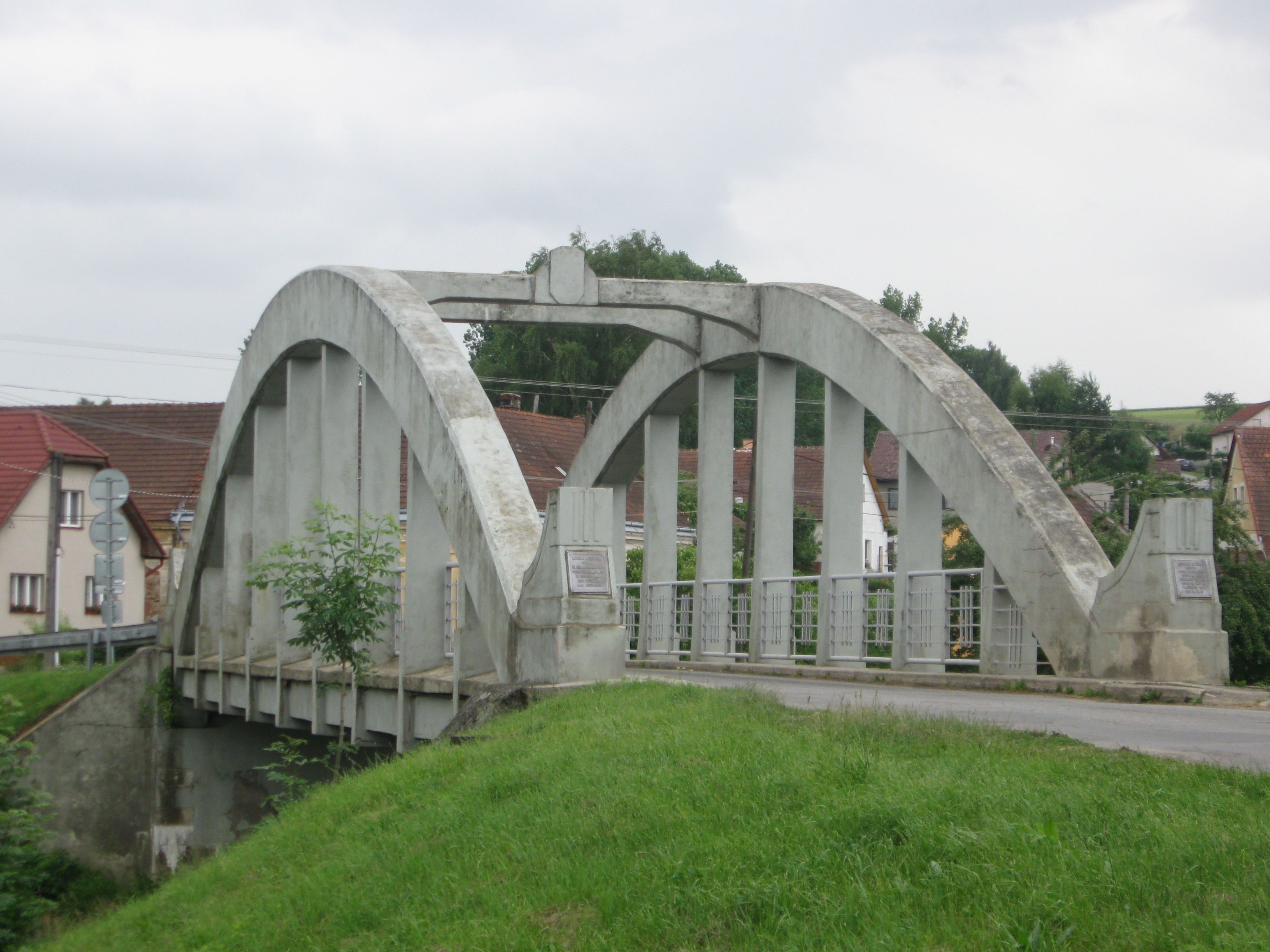 obloukový železobetonový most přes řeku Trnavu z roku 1912, projekt Ing. Stanislav Bechyně